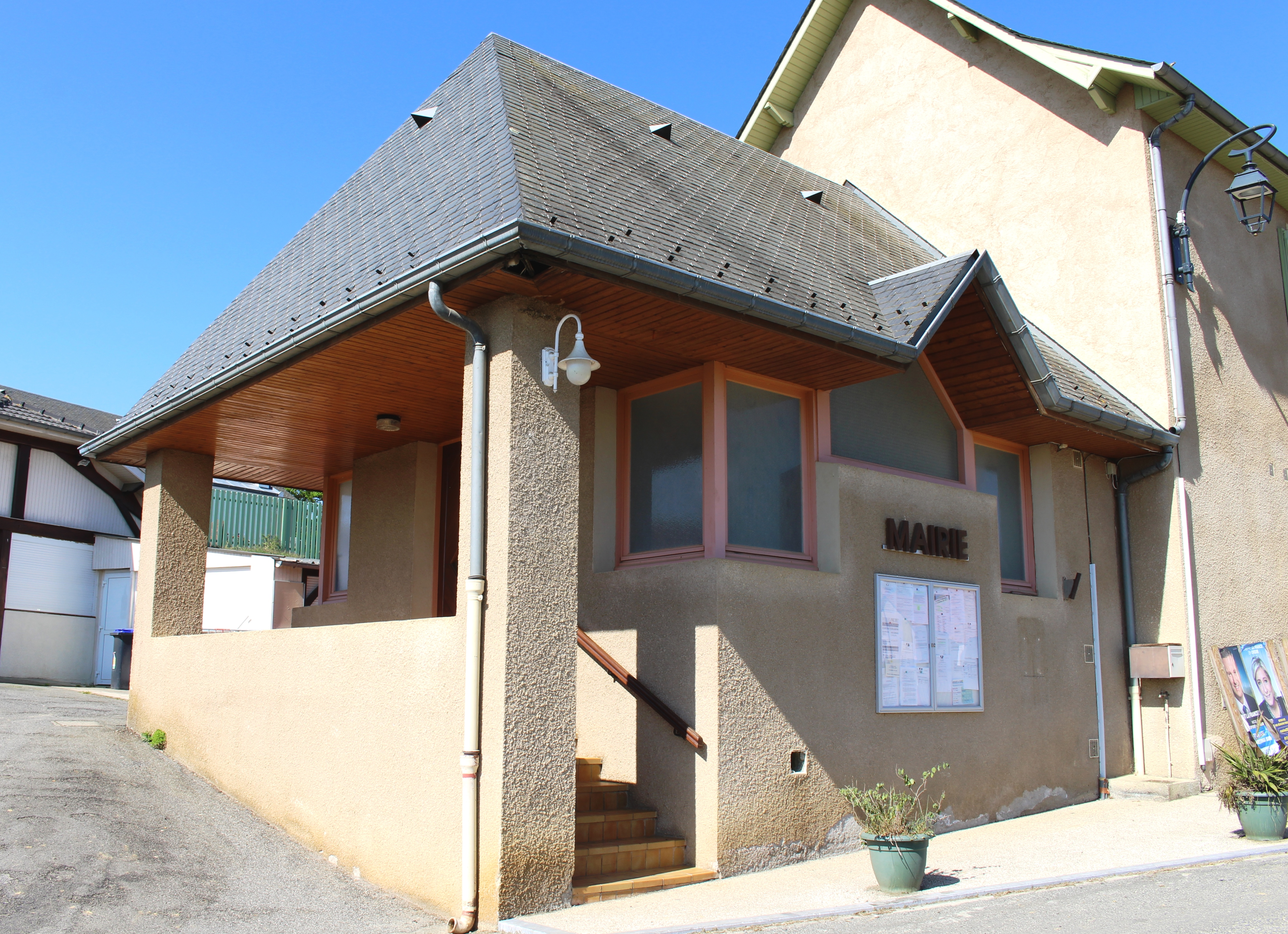 Mairie de Montignac (Hautes-Pyrénées)